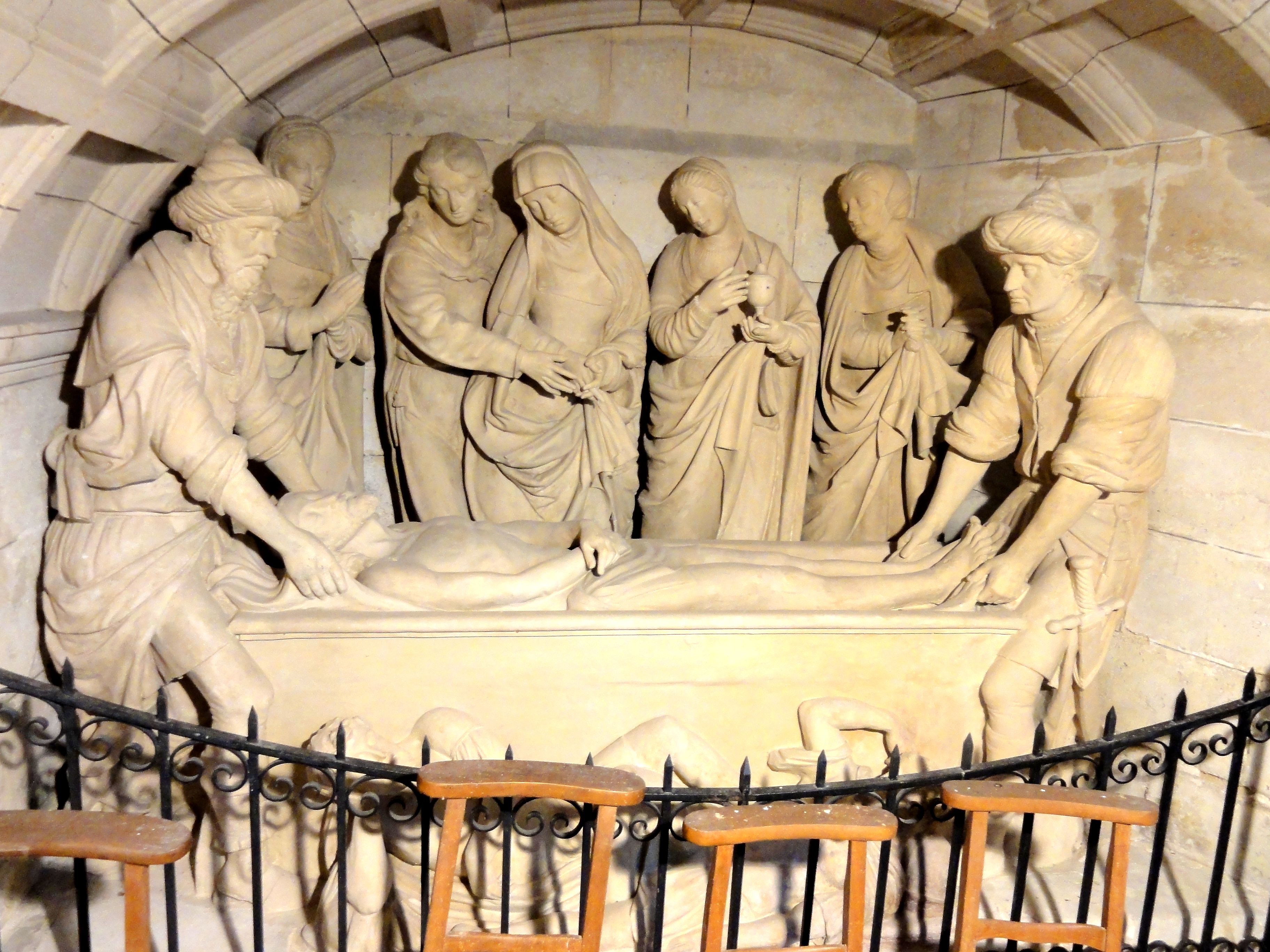 Saint-Sépulcre.